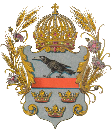 Wappen des Galizien